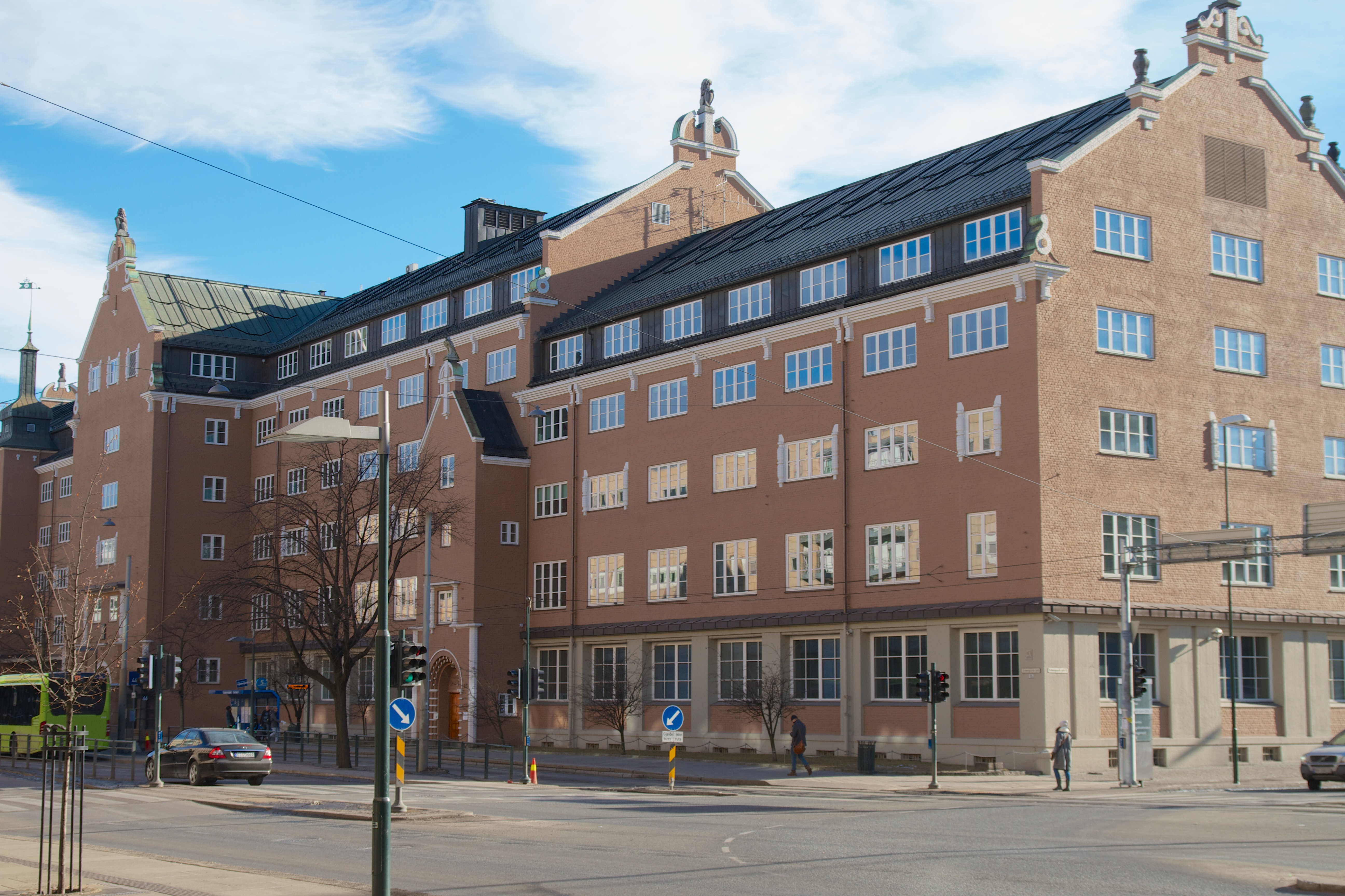 Schweigaards gate 15, Oslo. Her holder Toll- og avgiftsdirektoratet til.